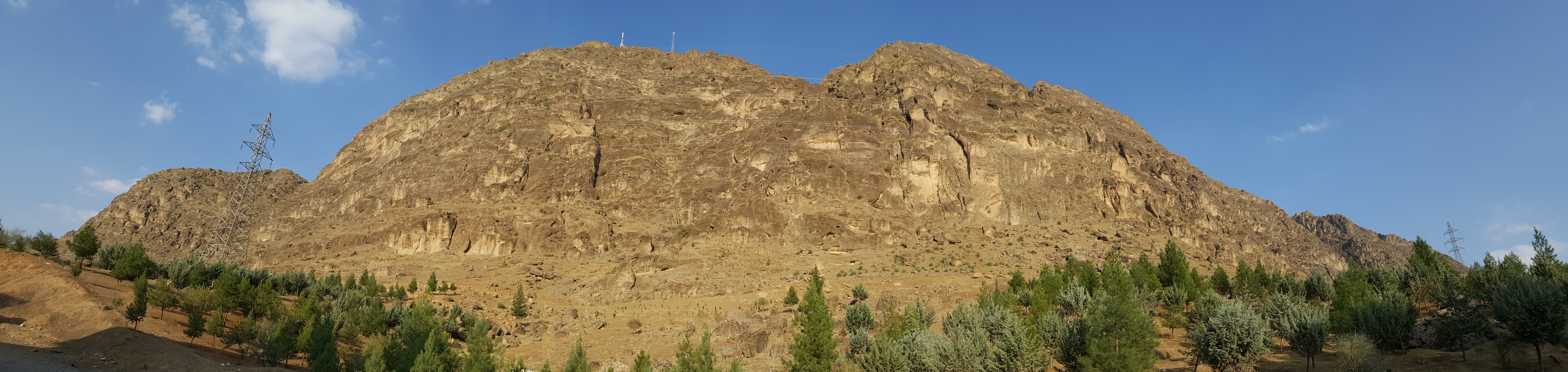 سراسرنما از مخمل‌کوه